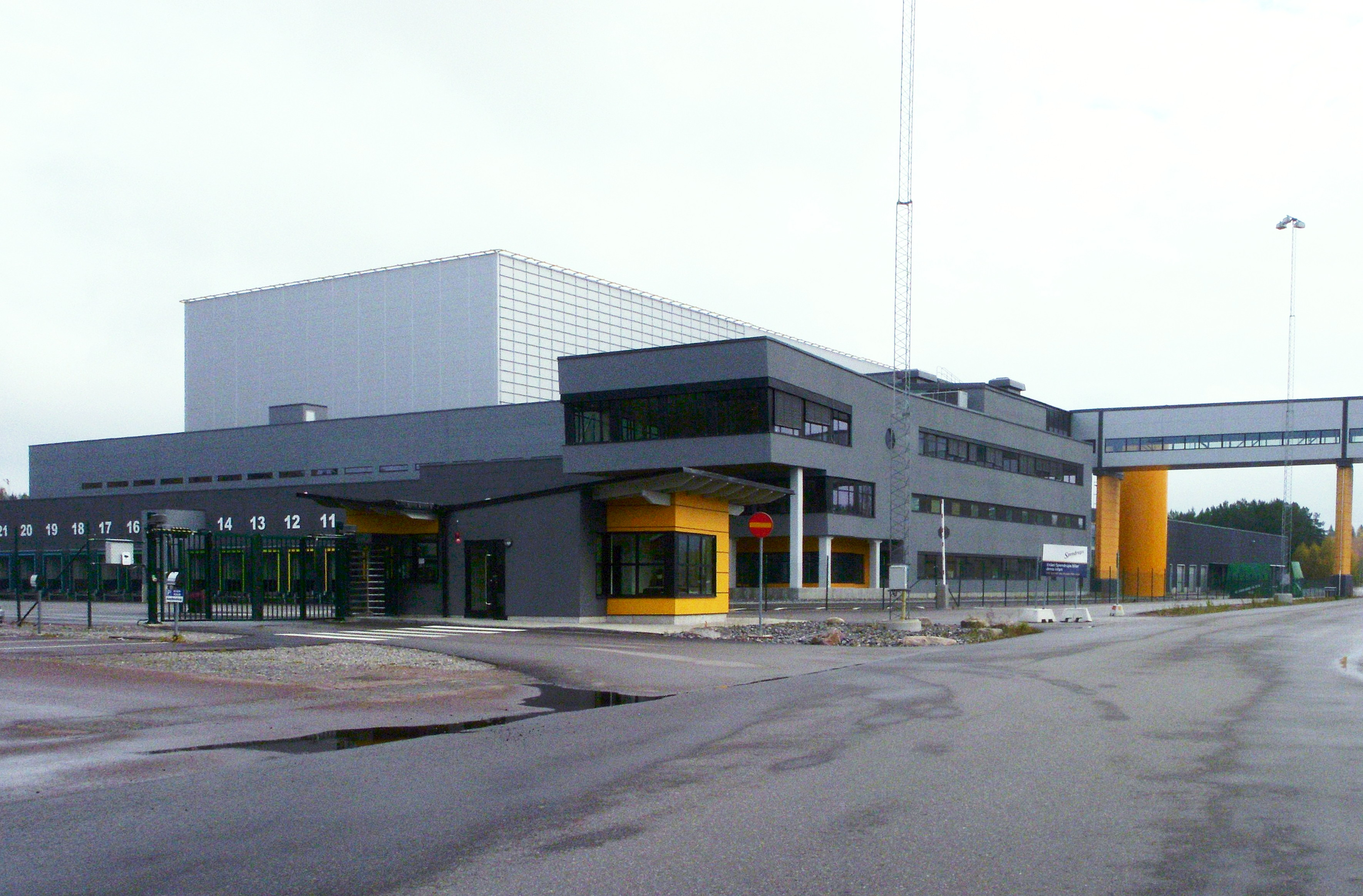 Spendrups nya anläggning i Grängesberg